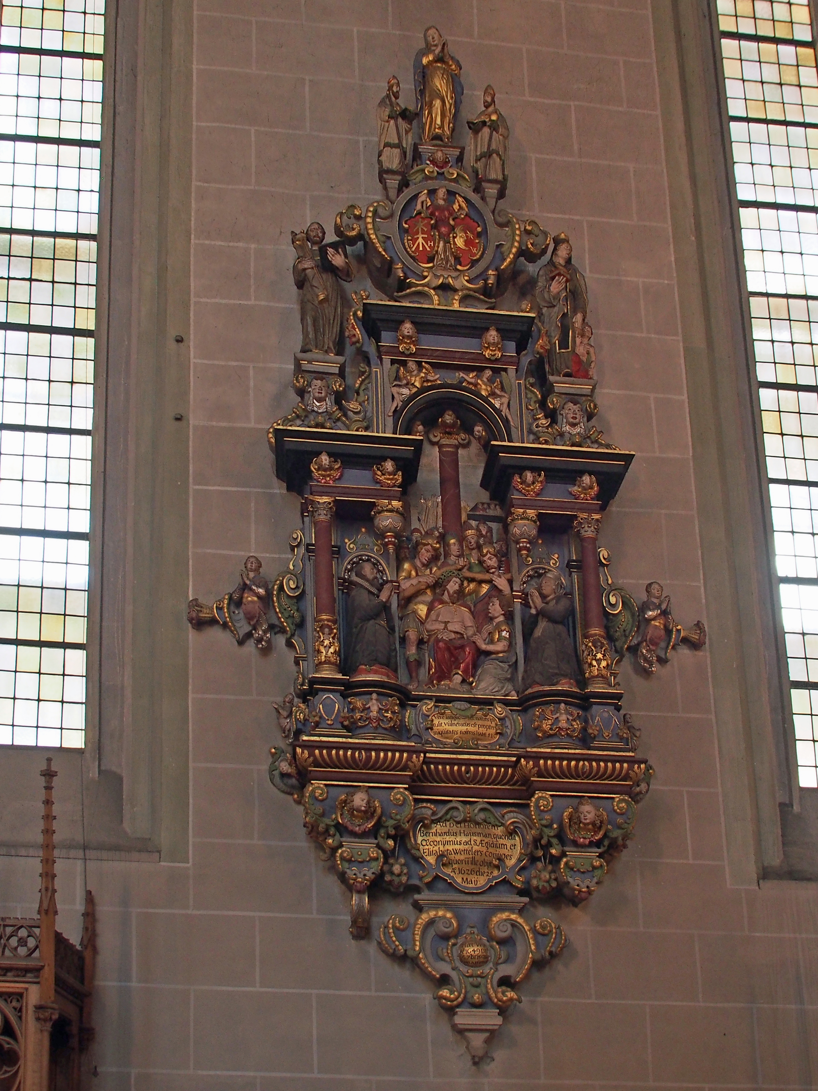 Epitaph in der Pfarrkirche Liebfrauen-Überwasser in Münster (Westfalen)